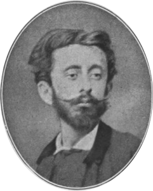 Photographie de Tristan Corbière (1845-1875) dans Les amours jaunes (Édition définitive), préf. de Charles Le Goffic - éd. Albert Messein (Paris) 1926